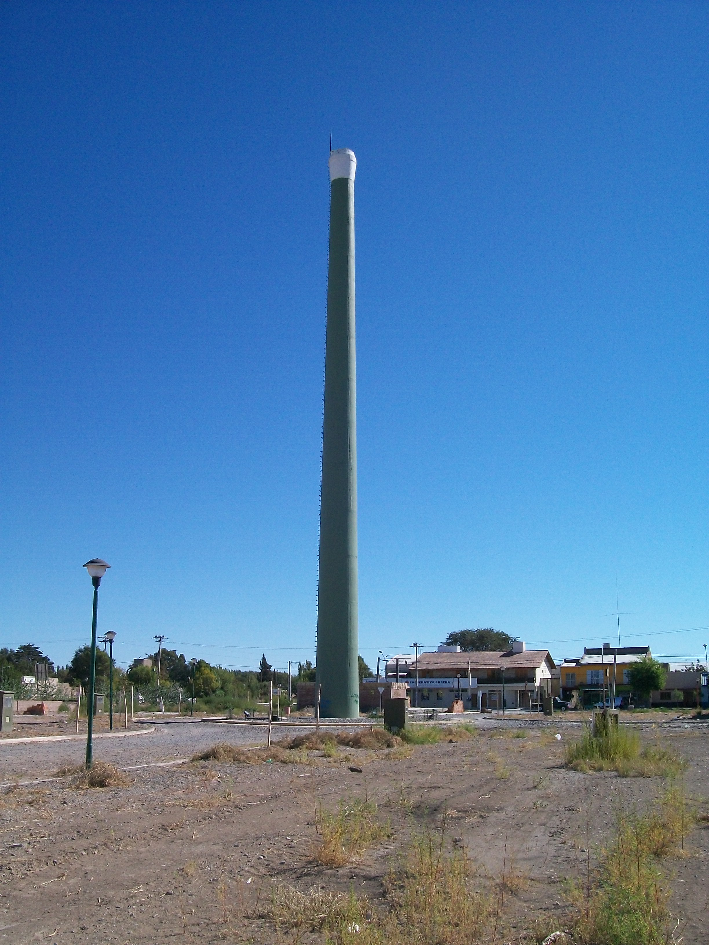 Chimenea de 25 m de alto de la antigua fábrica de conservas de tomate propiedad de la familia Bagliani. Ubicada en calle Antártida Argentina entre las calles M Rodríguez y Neuquén. La fábrica fue construida en 1934 y funcionó hasta 1990. Todos los edificios de la fábrica fueron demolidos excepto la chimenea que fue restaurada en abril de 2010 como parte del emprendimiento inmobiliario Los Aromos que subdividió el terreno ocupado por la fábrica para construcción de viviendas. Más información: Historia fábrica Bagliani Restauracion Chimenea Loteo Los Aromos